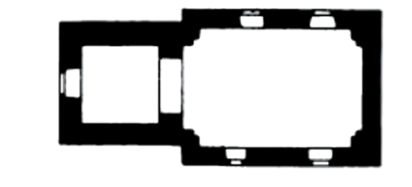 Rundriss der Kapelle in Bilme